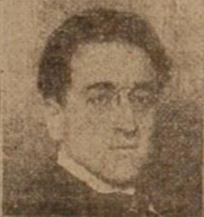 Antonio de Tomaso (1889-1933), político argentino de la ciudad de Buenos Aires, diputado nacional (1914-1930) y Ministro de Agricultura y Ganadería (1932-1933)